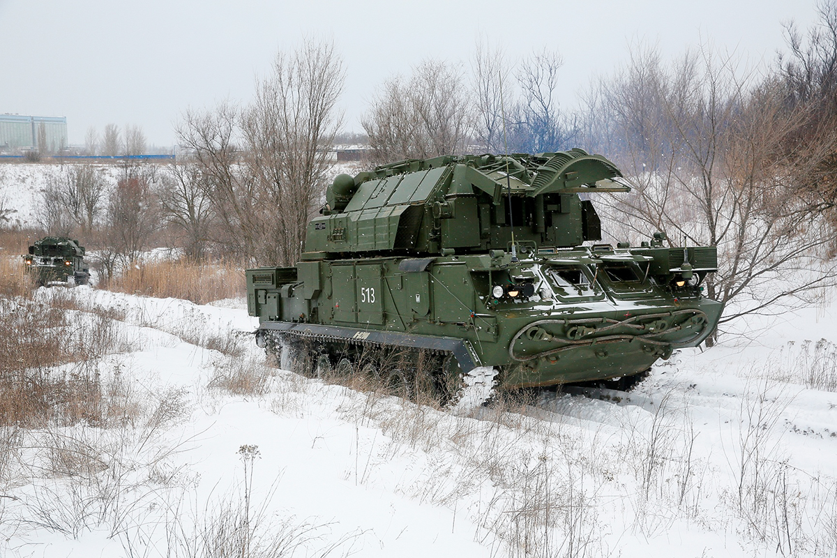 Расчёты Тор-М2У 150-й мотострелковой дивизии 8-й гвардейской армии завершили боевое слаживание в составе зенитного ракетного дивизиона.